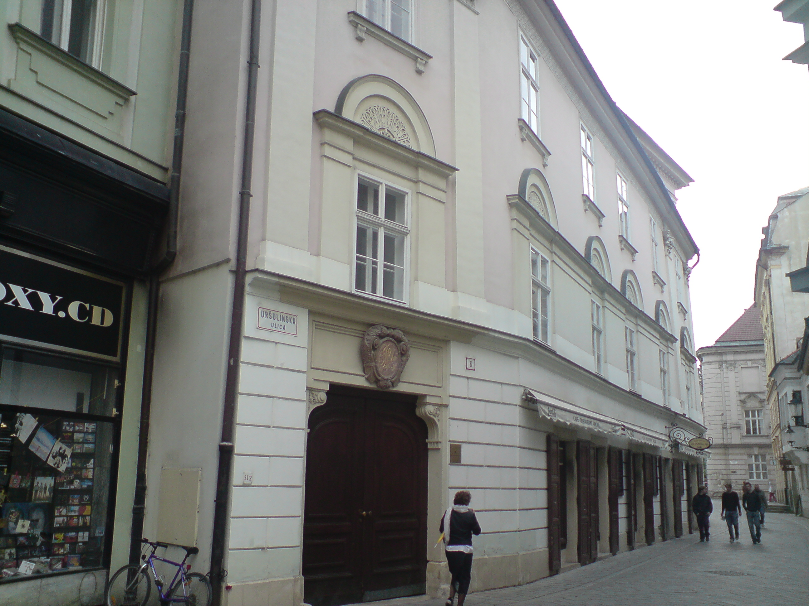 Palác Ruttkayovcov Vrútockých, Uršulínska, Bratislava